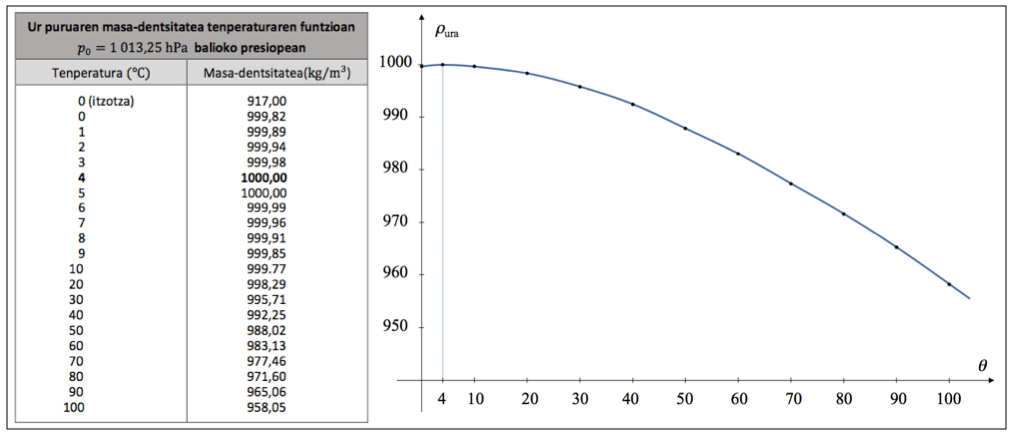 Ur puruaren dentsitatearen balioen taula eta horiei dagokien grafiko lineala.